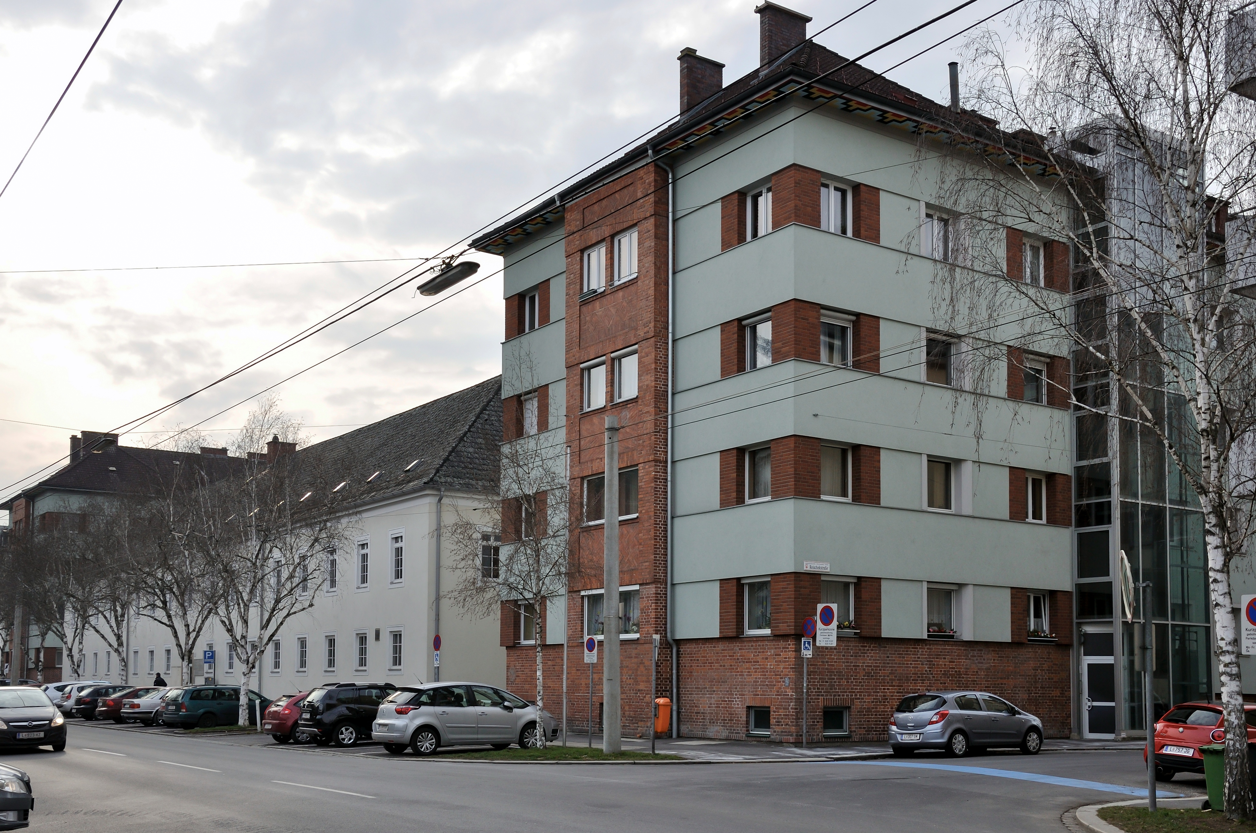 Dametzhof